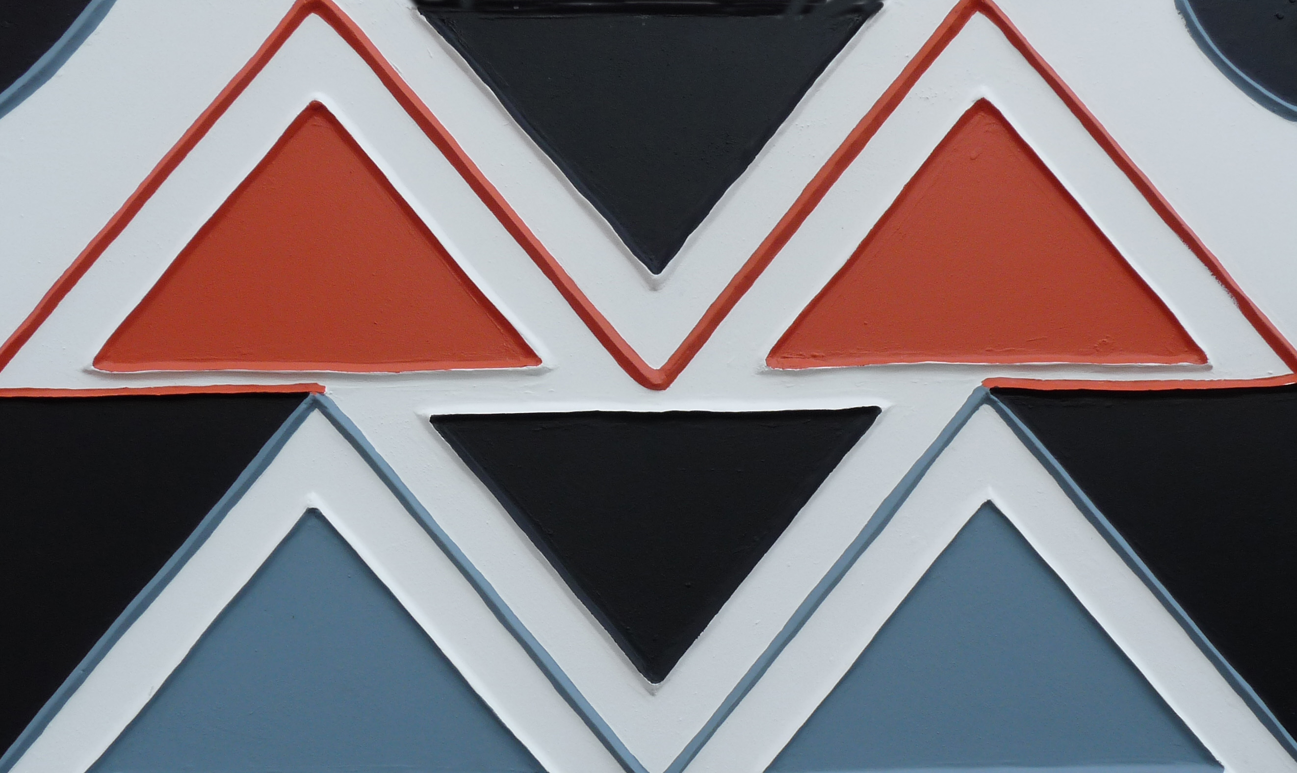 Motifs géométriques traditionnels de l'art Imigongo, né à la fin du 18e s. dans la province de Kibungo (Rwanda). Panneaux installés à Saint-Dié-des-Vosges dans le cadre du 22e Festival international de géographie où le Rwanda était le pays invité.